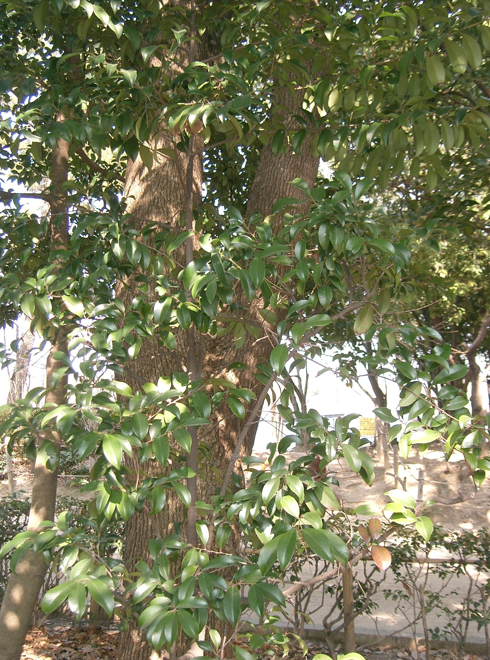 Cleyera japonica